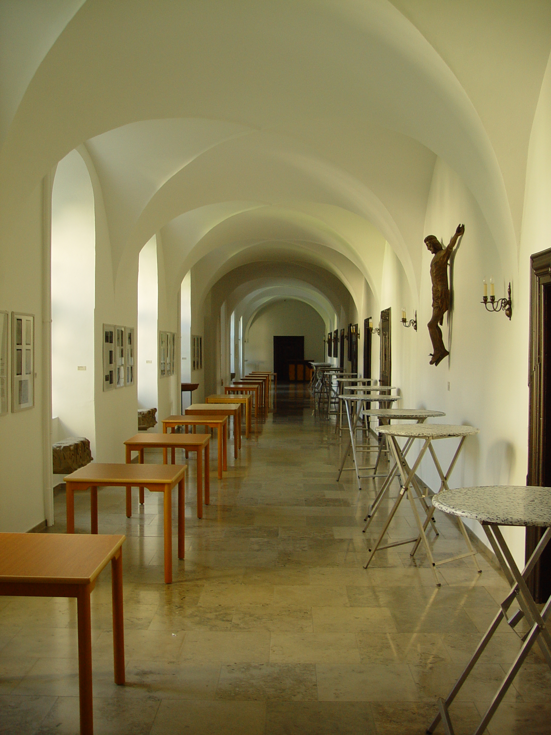 Innengang Kloster Grafschaft